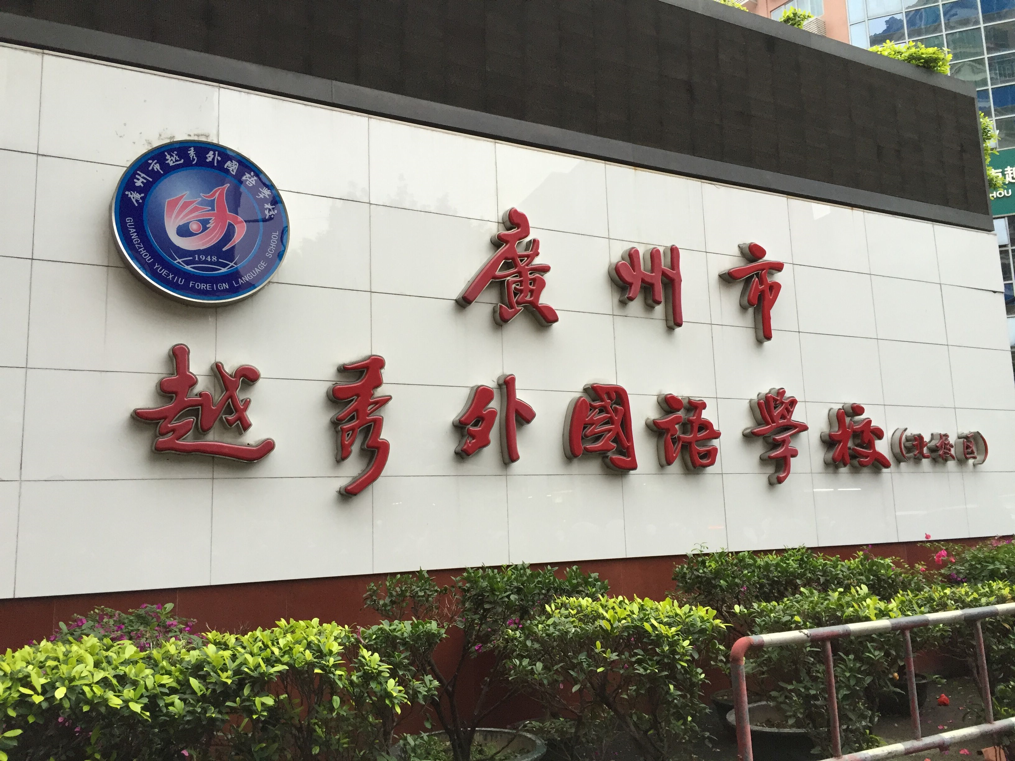 廣州市越秀外國語學校北校區